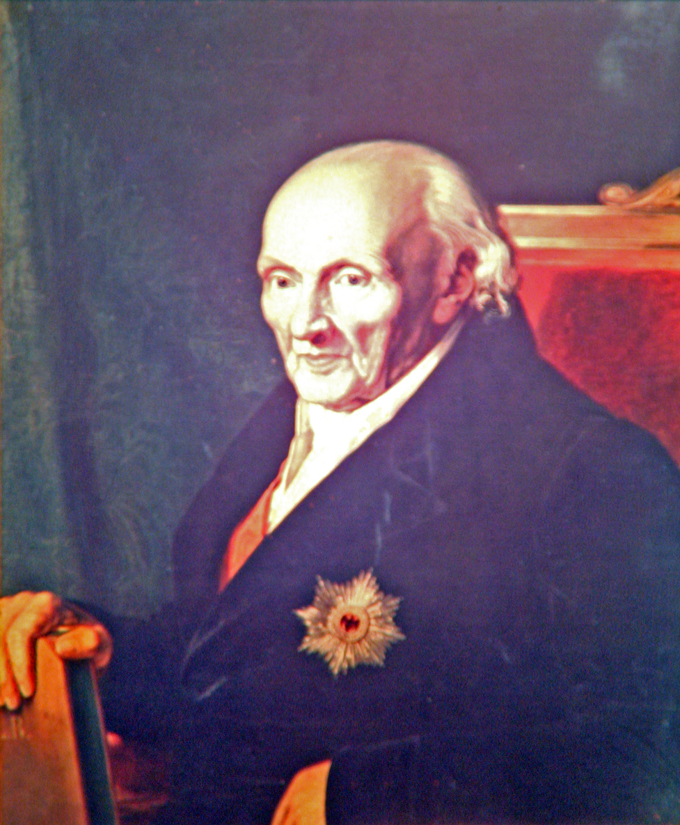 Heinrich Dietrich von Grolman, Gemälde von Carl Joseph Begas, Öl auf Leinwand